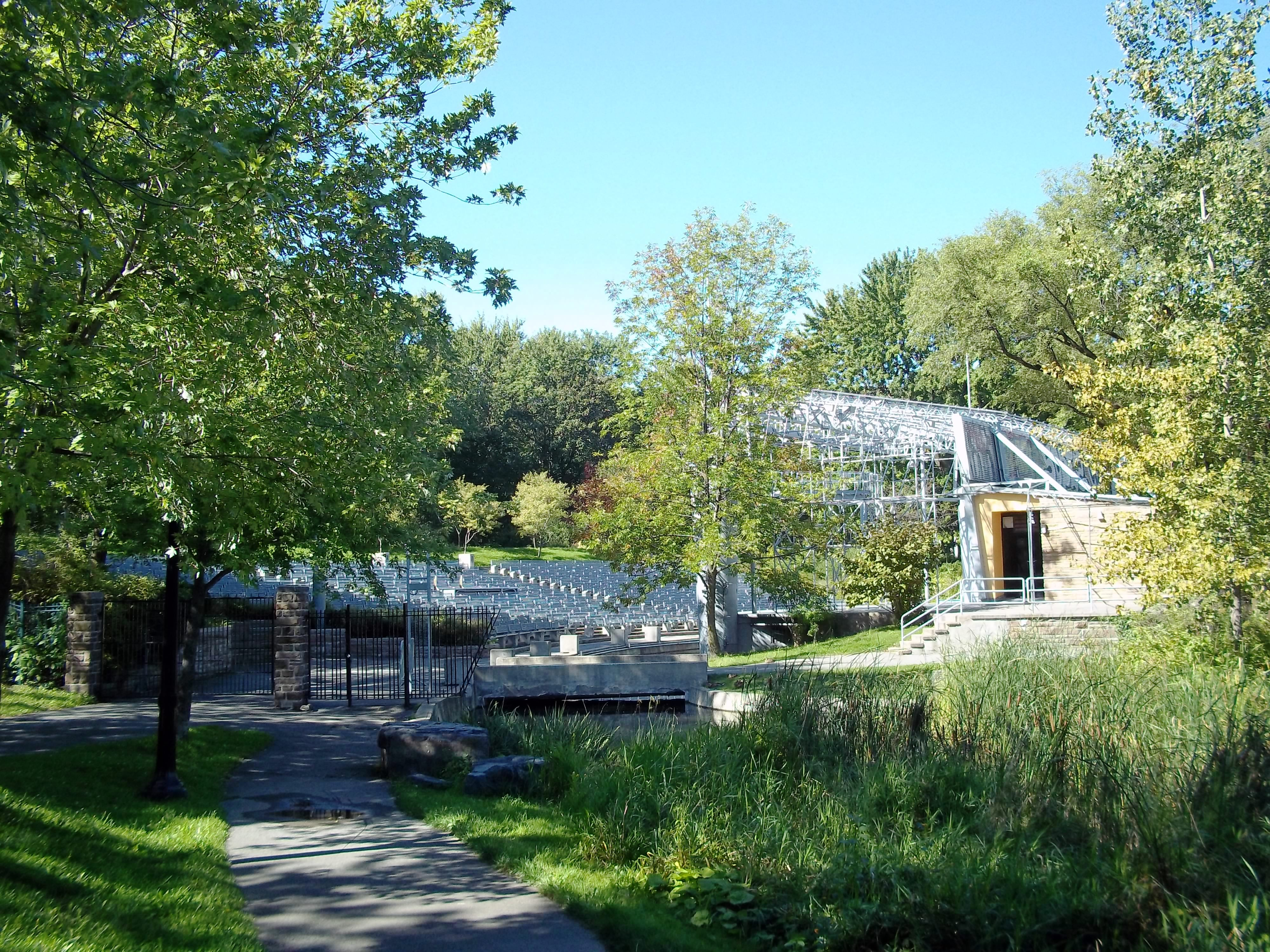 Théâtre de Verdure, parc La Fontaine, Montréal